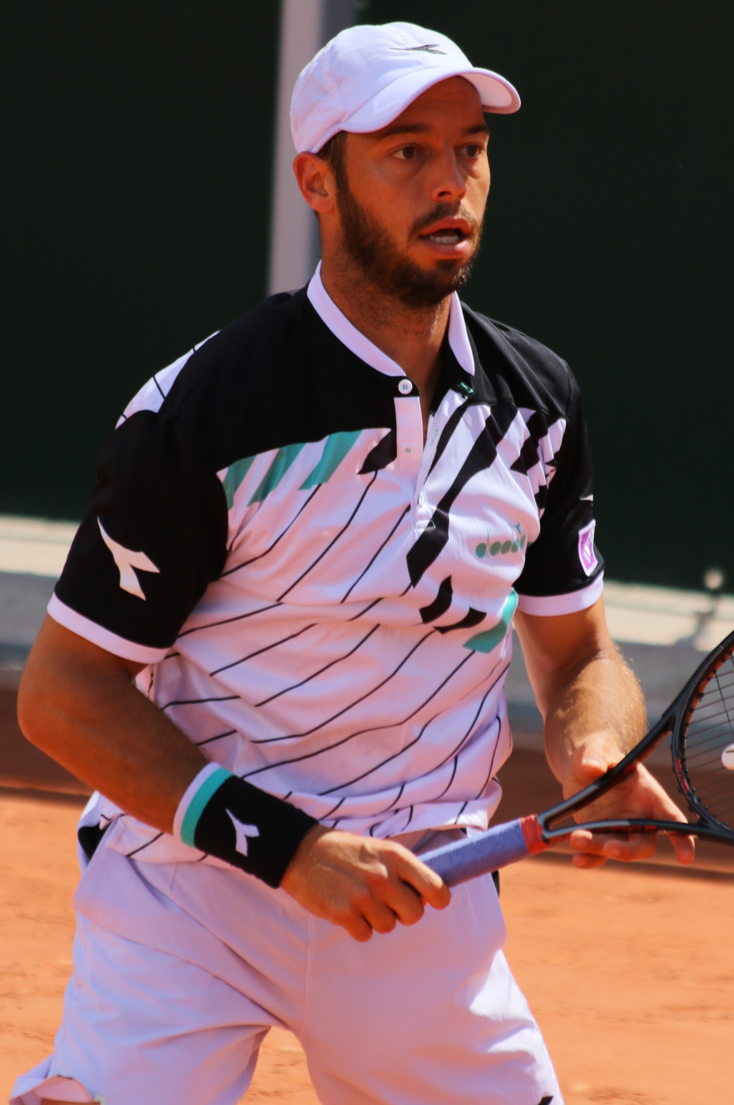 Puetz RG19 (15)